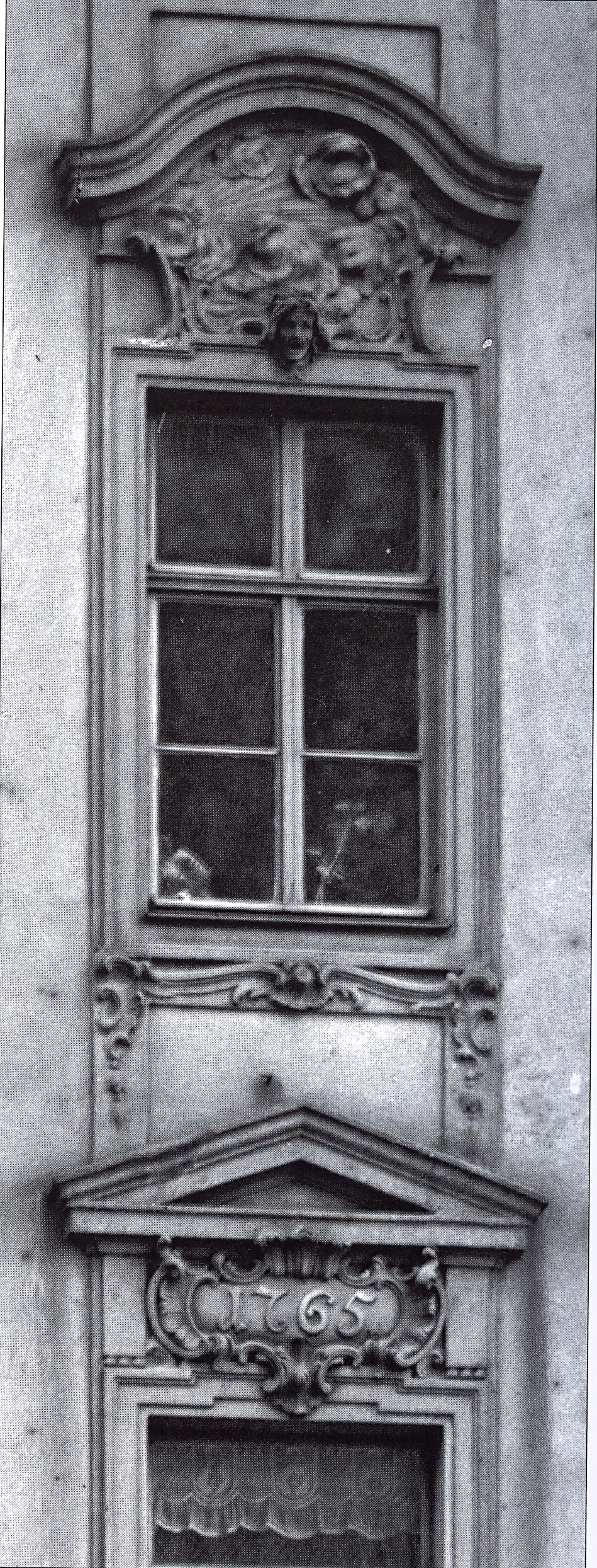 Zittelsches Haus, an der Frauenkirche 20, Dresden, ornamentales Detail des Mittelrisalits